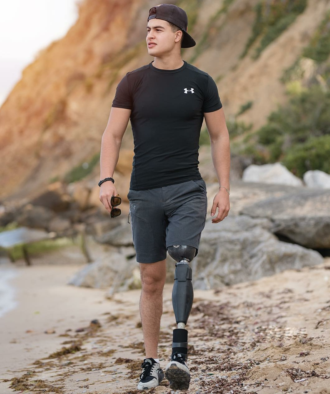 Portrait de triathlète Mohamed Islam Bouglia